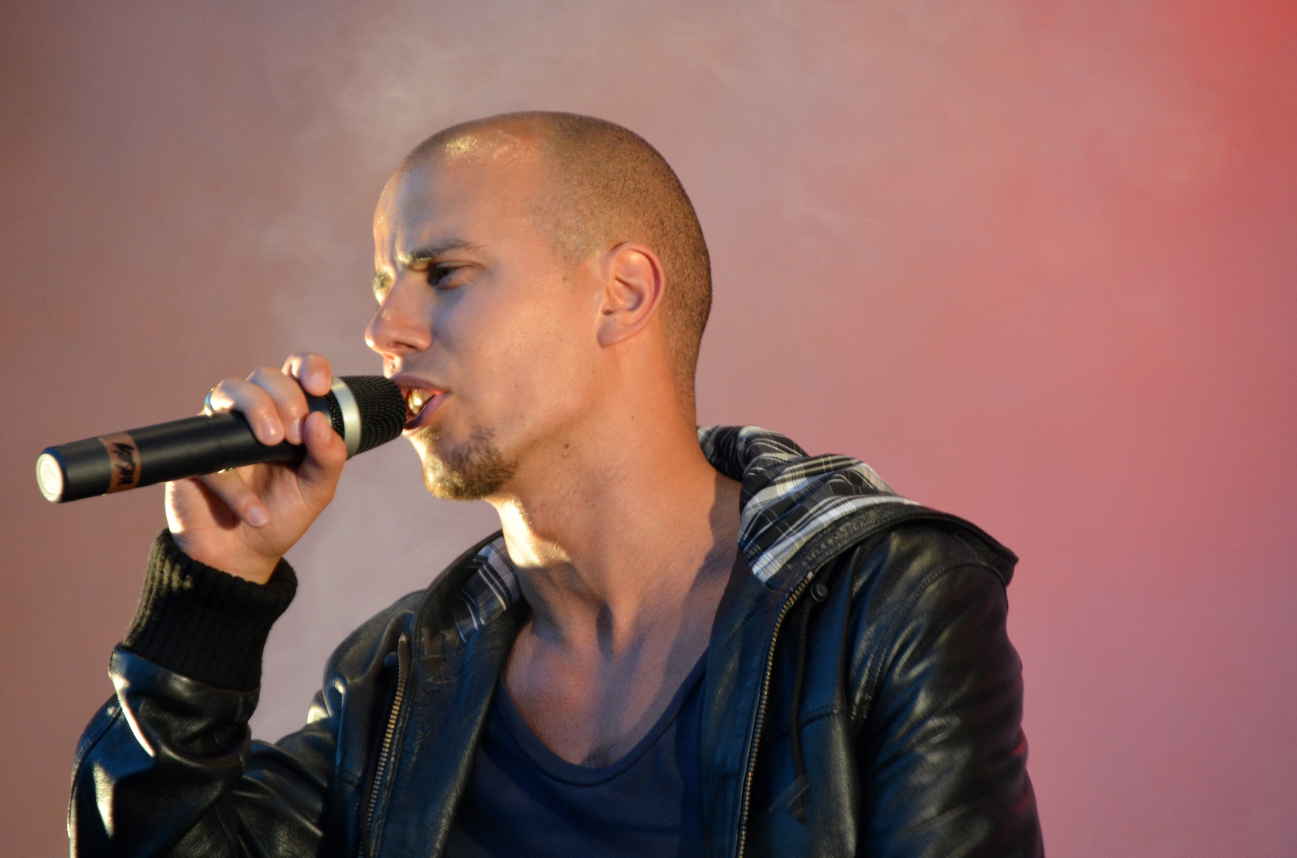 Magdi Omar Ytreeide Abdelmaguid fra Karpe Diem under en konsert i Langesund 2011.